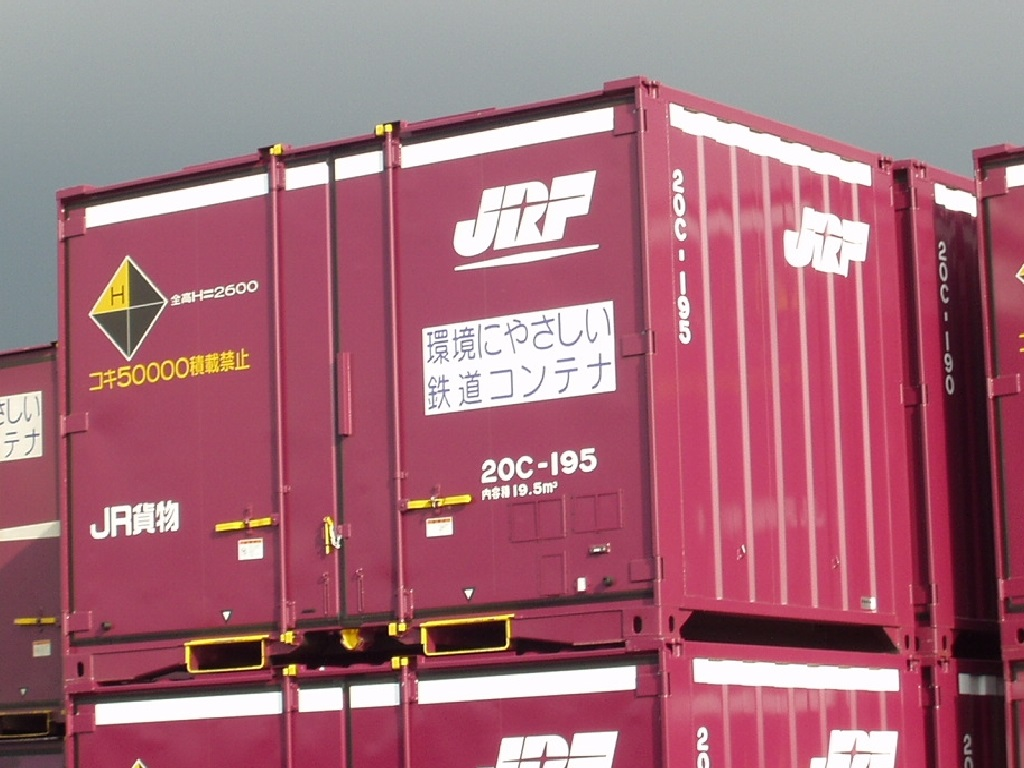 撮影地＝【大阪(タ)】